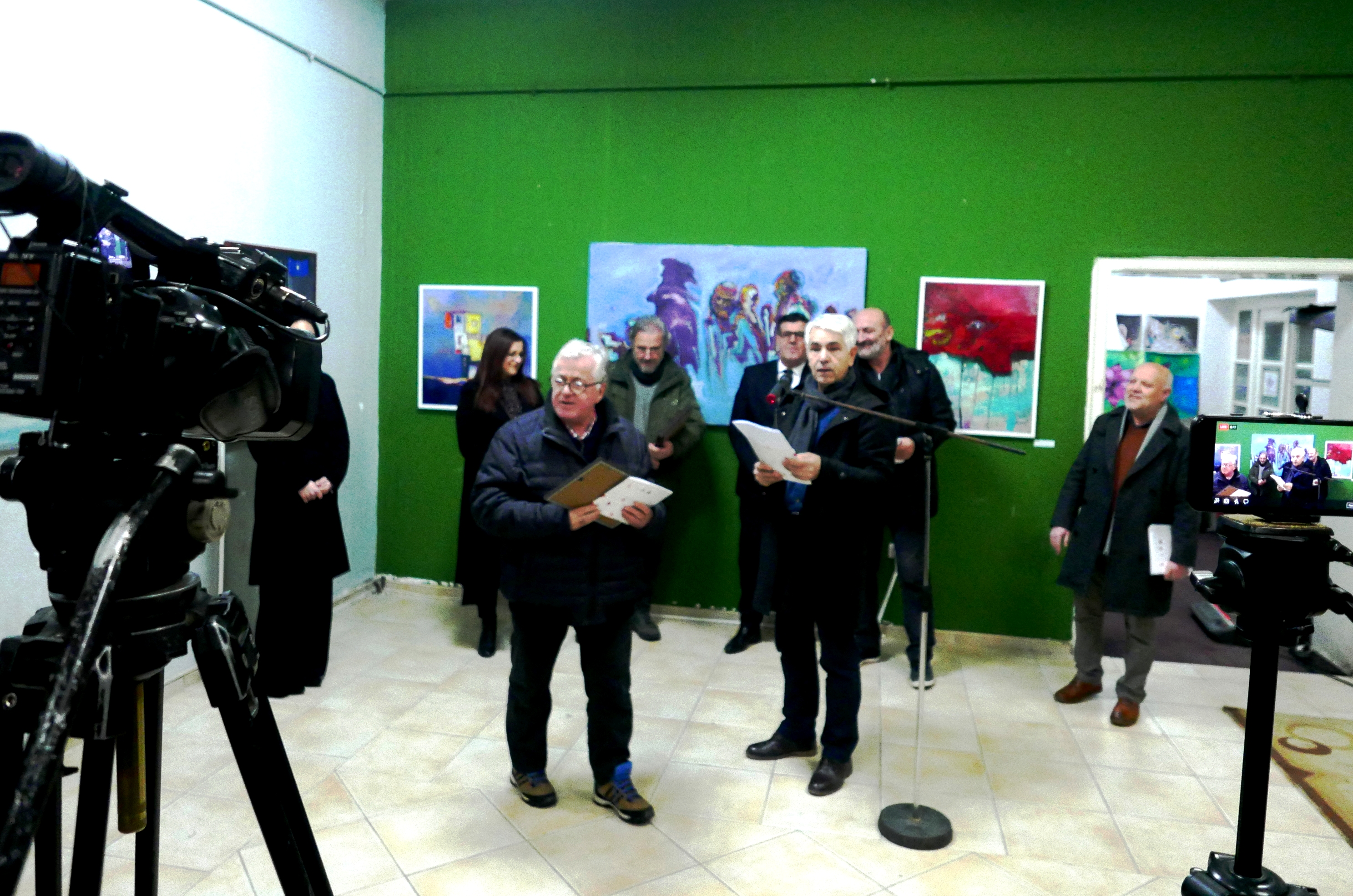 Ekspozita e Artit pamor " Flaka e janratit 2019"